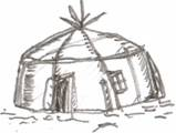 Yaranga